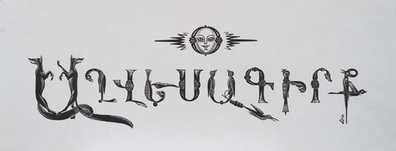 Աղվեսագիրք 1935